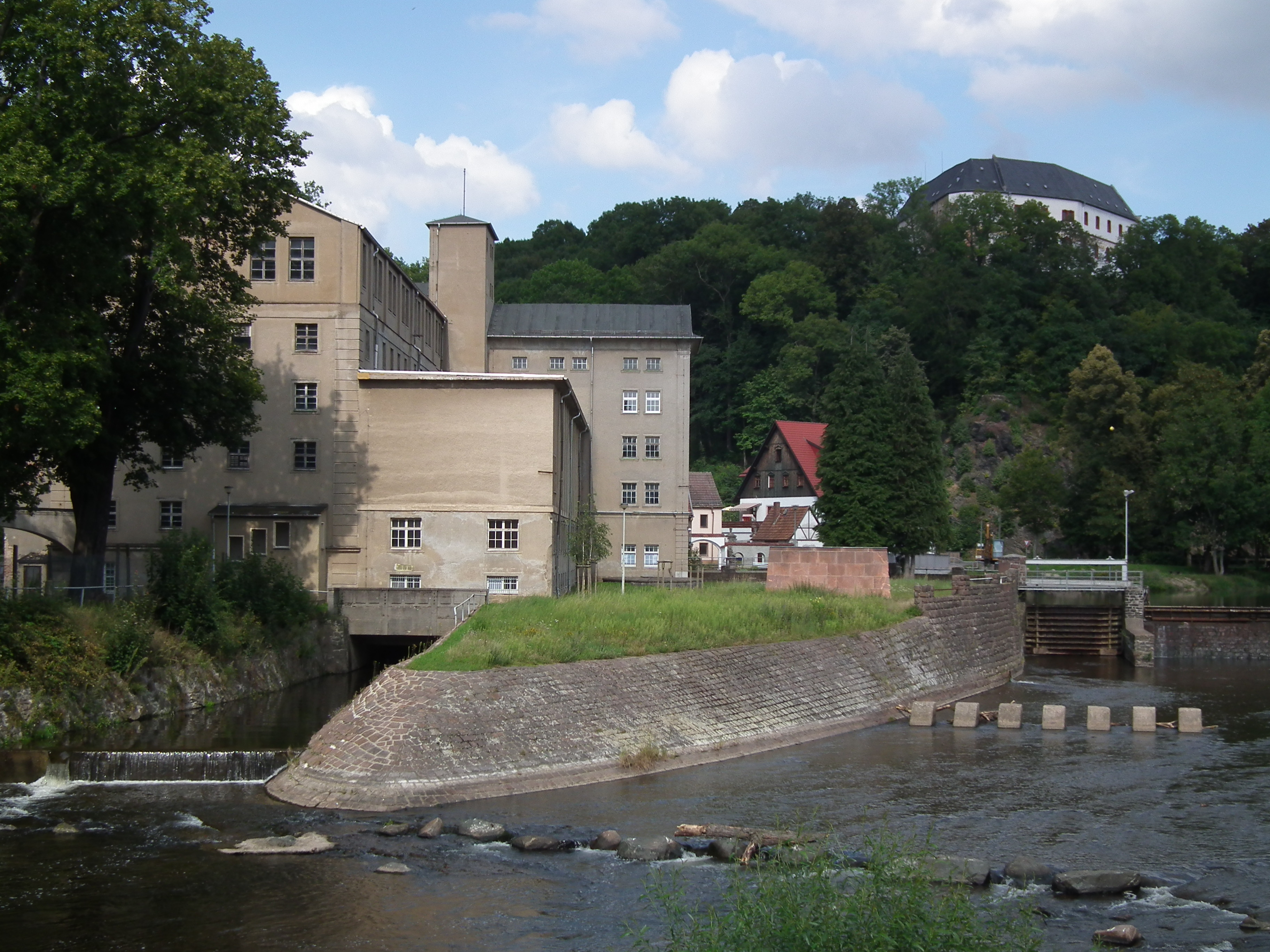 Sachsenburg